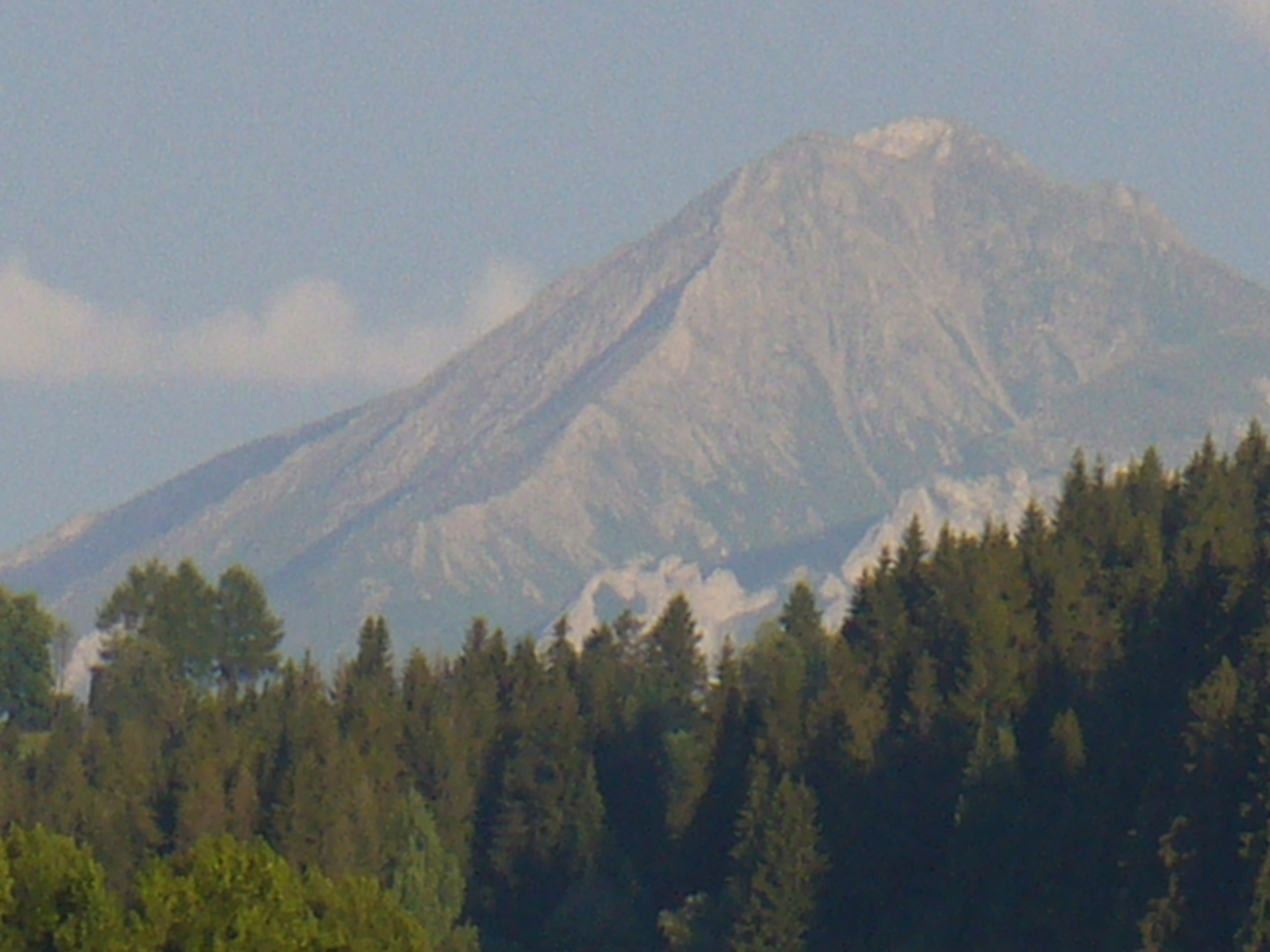 Widok na Hawrań